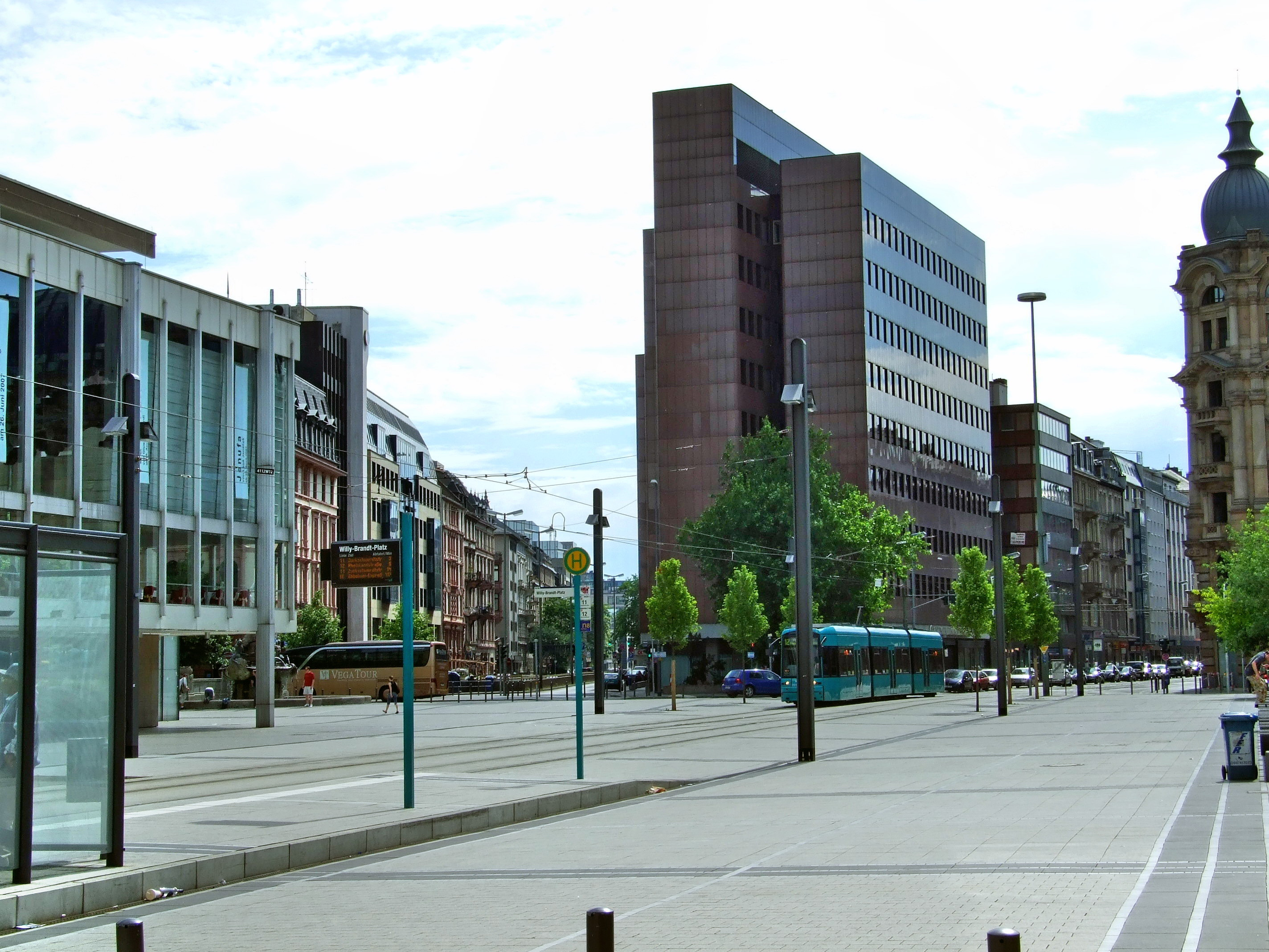 Willy-Brandt-Platz Ffm, Westseite mit Gutleutstraße (links) und Münchnerstraße (rechts)